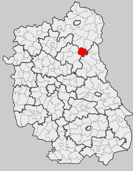 Map of gmina Podedwórze, Parczew county, Lublin voivodship Mapa gminy Podedwórze, powiat parczewski, województwo lubelskie